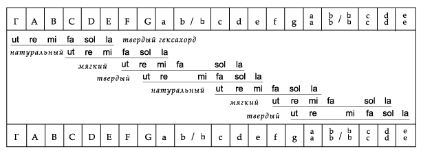 Гвидонов звукоряд (привязка ступенных слогов к высотам звукоряда)